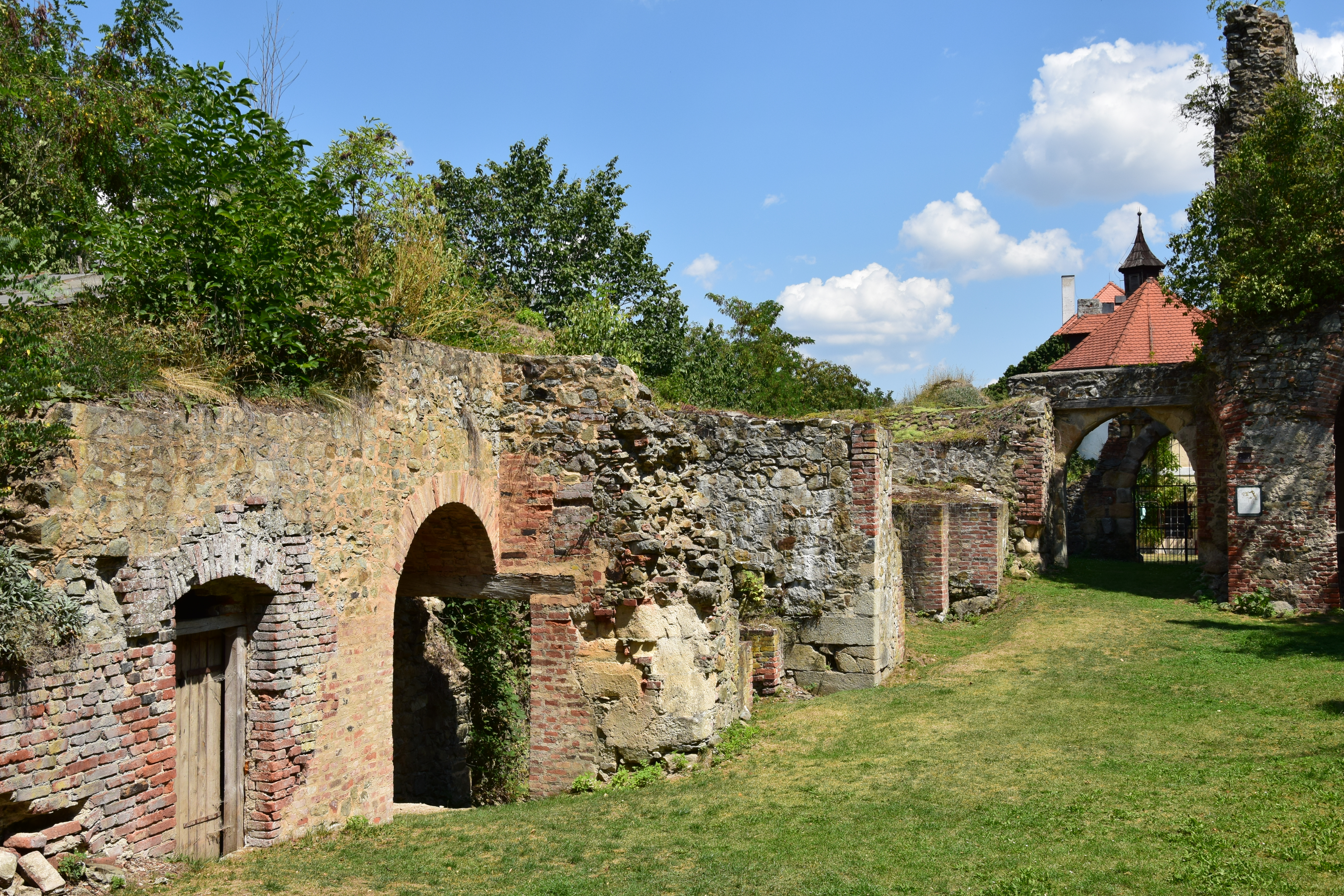 Roupov – nádvoří hradního jádra a pozůstatky zástavby severozápadní strany